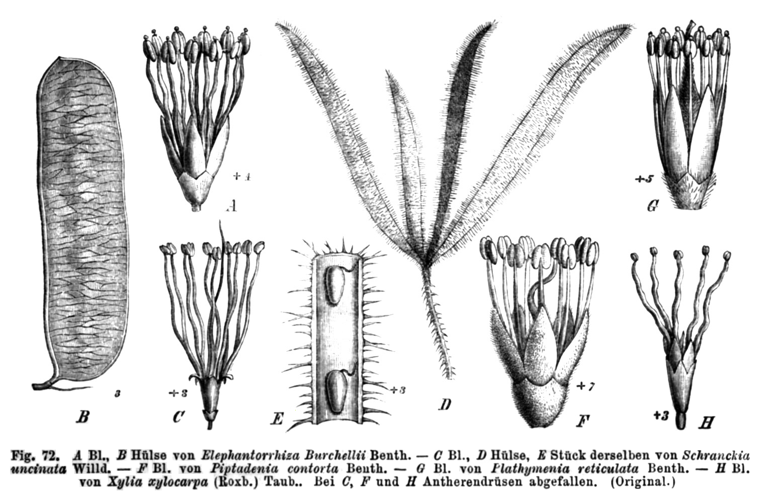 Illustration from Natürliche Pflanzenfamilien, Vol. III: A-B. Elephantorrhiza burchellii Benth. = Elephantorrhiza elephantina (Burch.) Skeels. (Leguminosae), C-E. Schranckia uncinata (Goupiaceae), F. Pseudopiptadenia contorta (Leguminosae), G. Plathymenia reticulata (Leguminosae), H. Xylia xylocarpa (Roxb.) Taub. (Leguminosae)